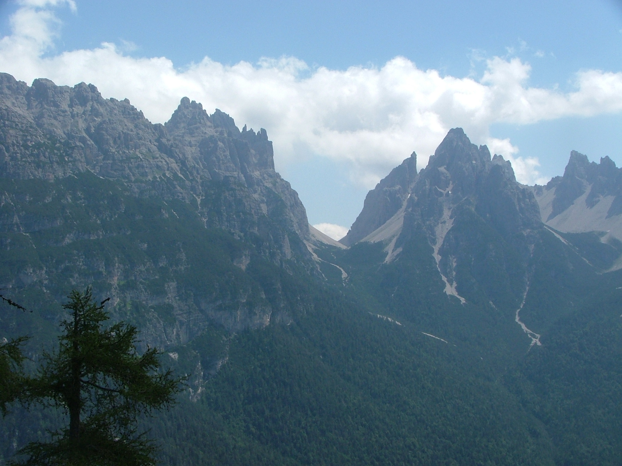 Forcella (fork) Scodavacca, Monfalconi Spalti di Toro, Province of Belluno, Veneto, Italy